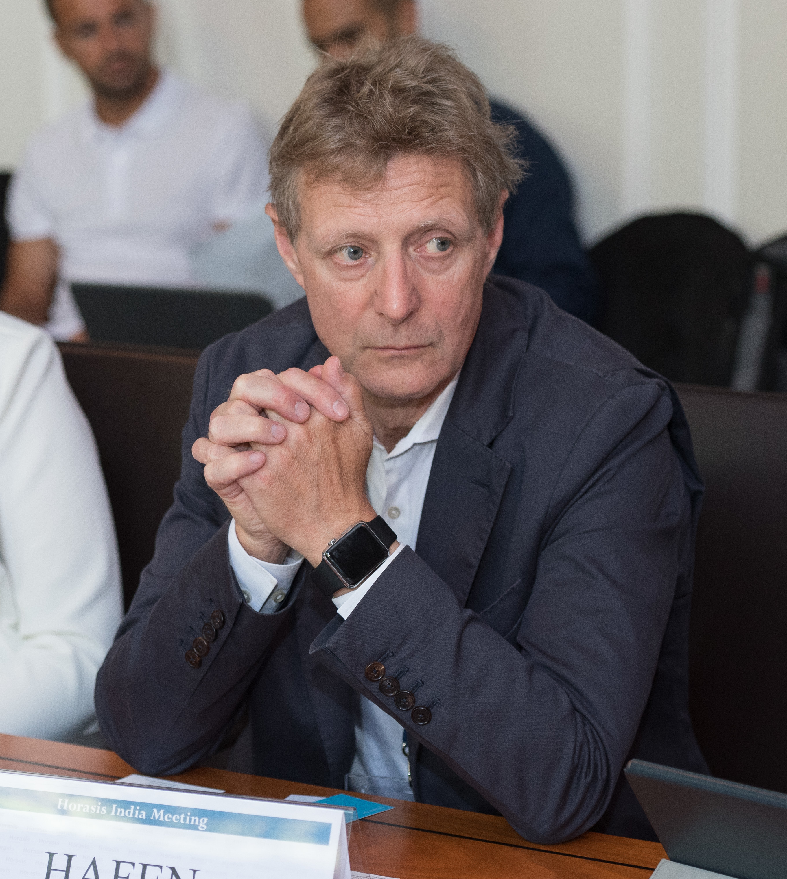 Horasis India Meeting, Interlaken, Switzerland, 25-26 June 2017